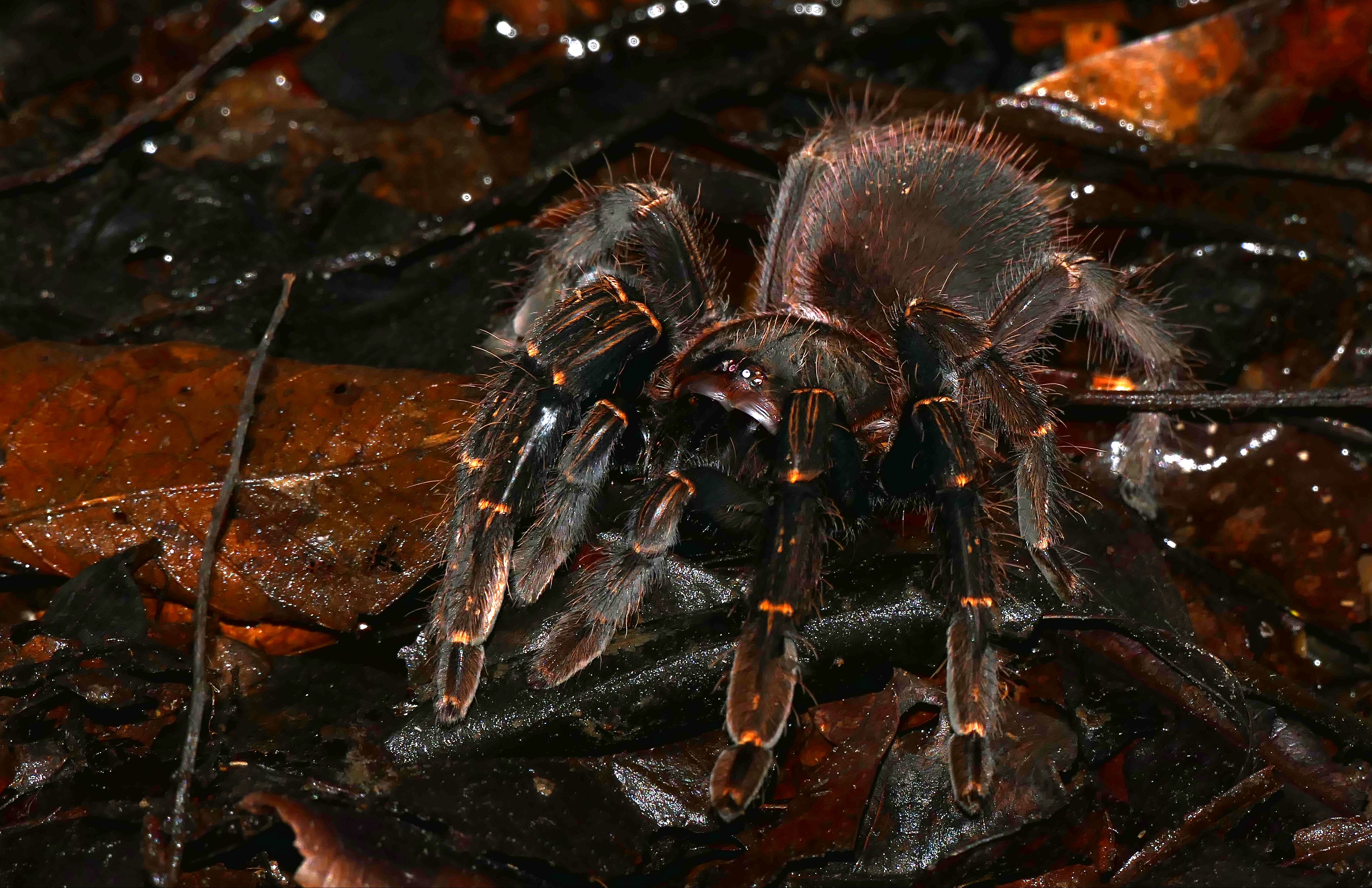 Montagne de Kaw, Roura, French Guyana, FRANCE